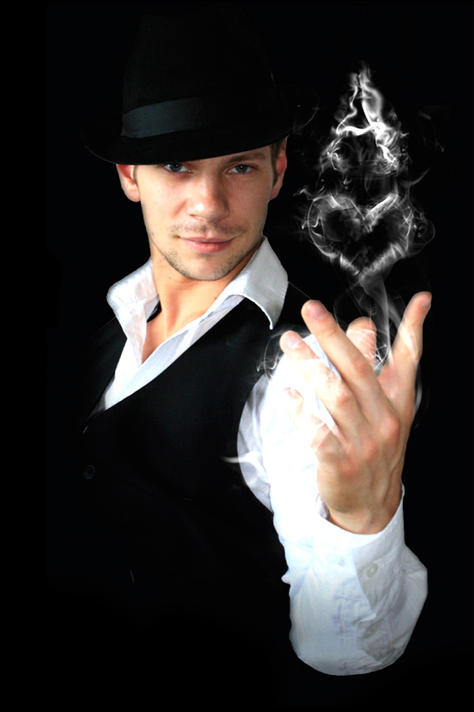 Artem Shchukin - Артем Щукин